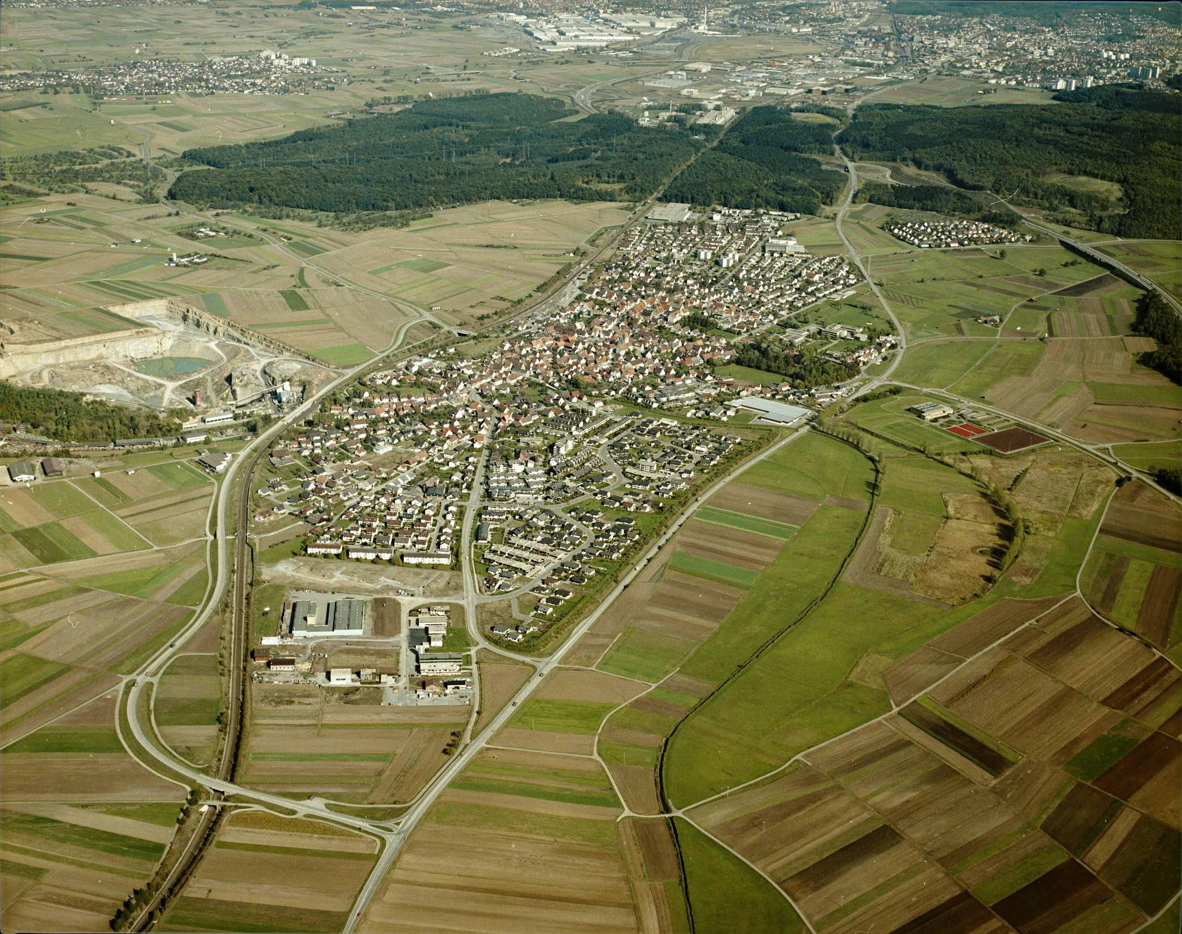 Luftbild von Ehningen - Staatsarchiv Sigmaringen - Archivalieneinheit N 1/96 T 1 Nr. 482